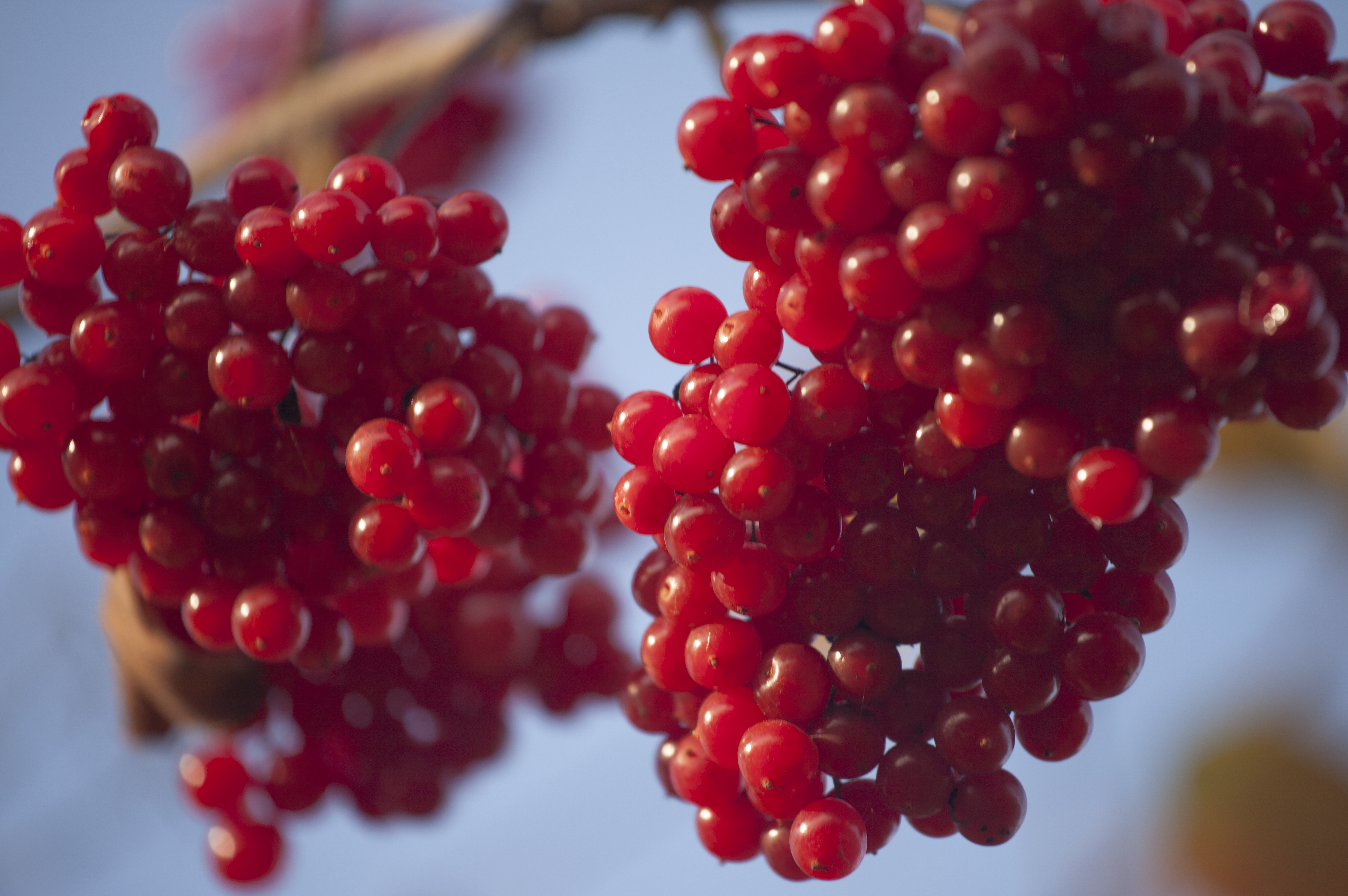 калина созрела